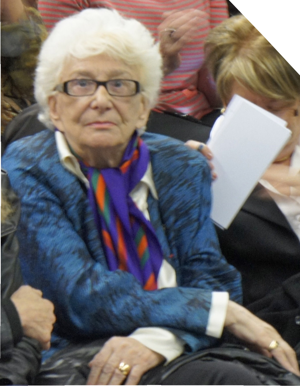 Yvette Roudy, ancienne ministre de France.